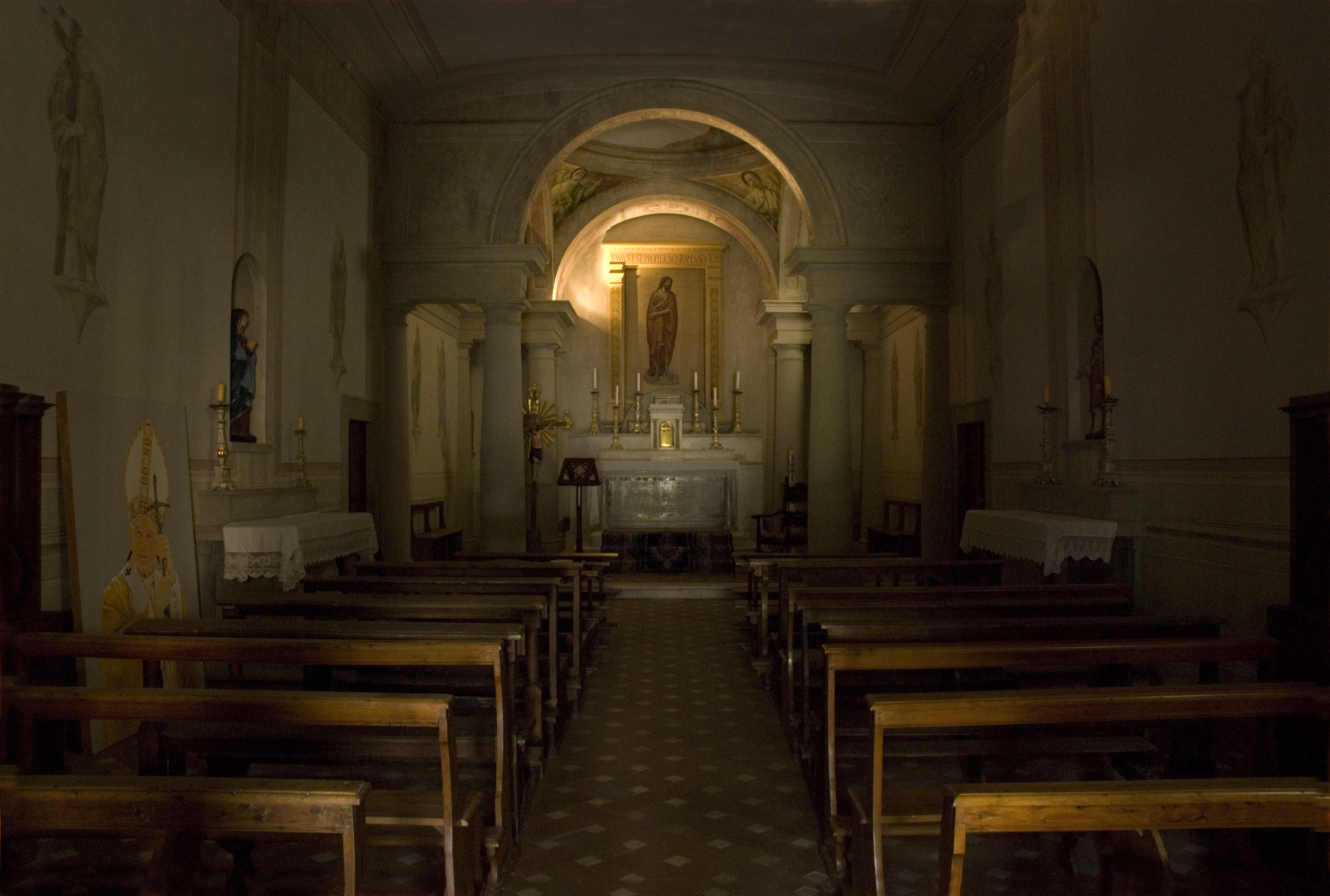 Chiesa di San Cresci interno (Greve in Chianti)